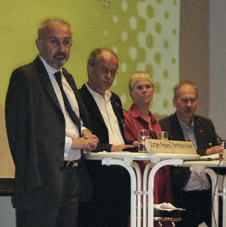 Igm peters huber roelke roeder